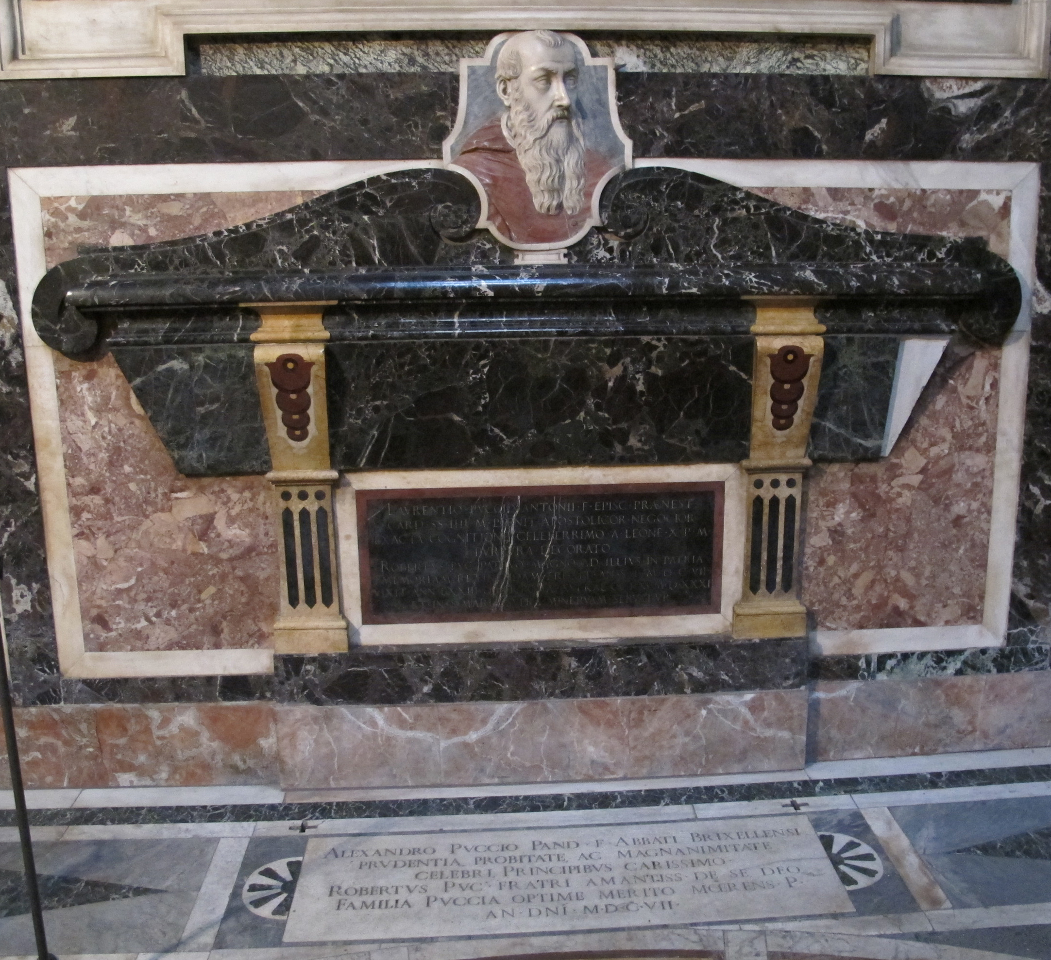 Ss. annunziata, cappella pucci 14 tomba alessandro e lorenzo pucci